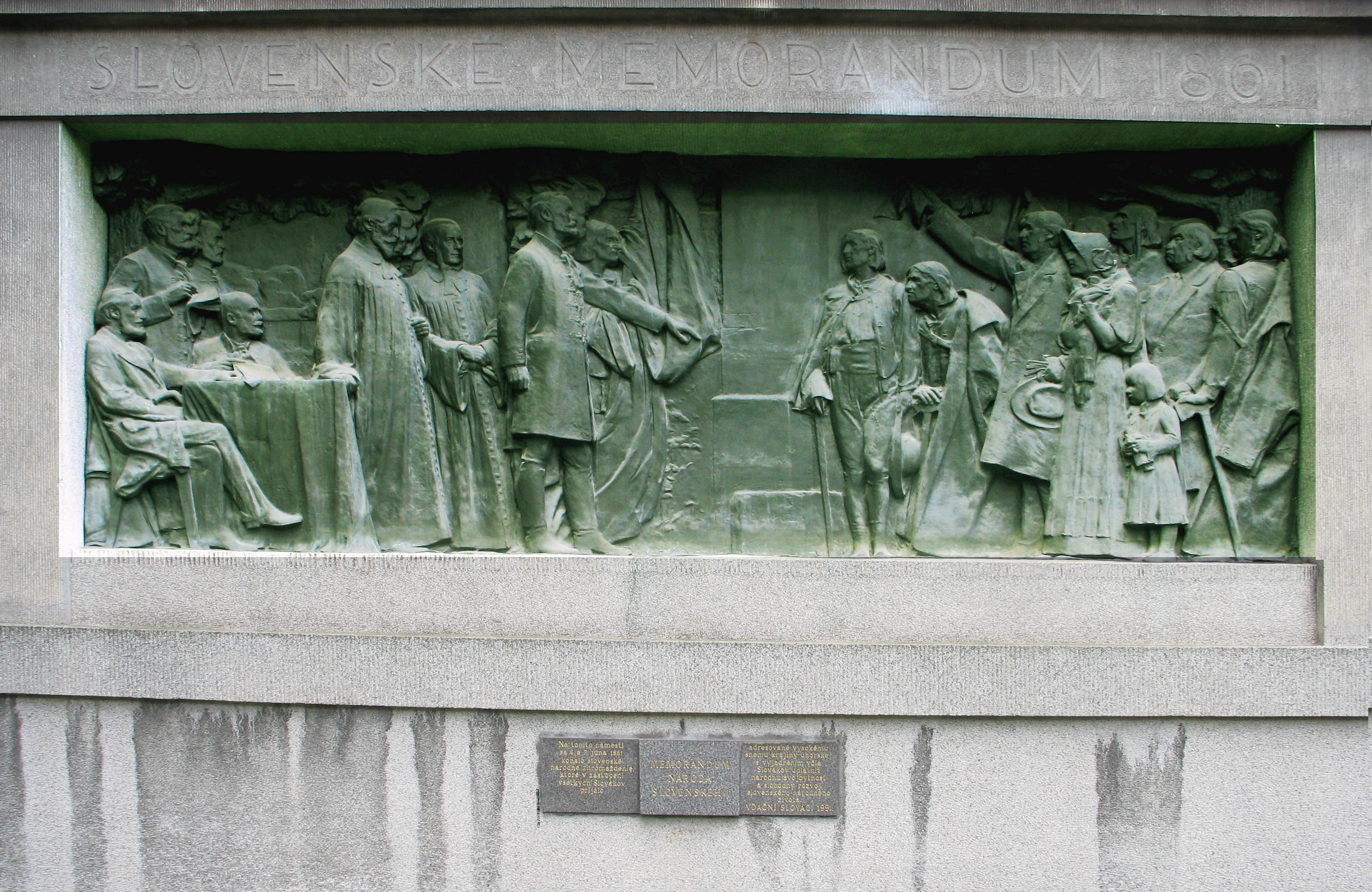 Memorandový reliéf "Hlas povstania"